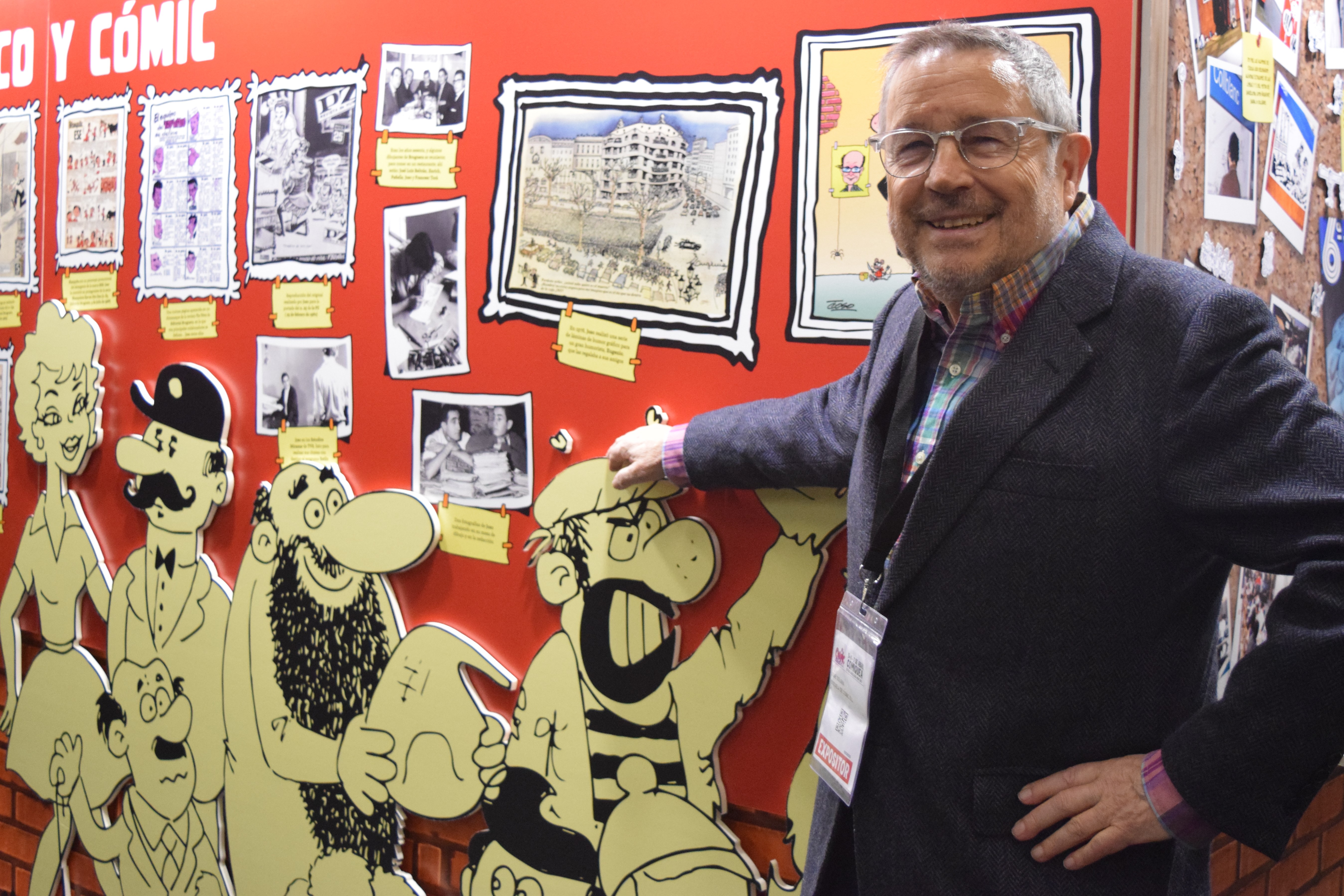 Josep Solana "Joso" mostra l'exposició dedicada a ell: Exposició "Joso, The expo". Exposició en homenatge al 80è aniversari de l'humorista gràfic Josep Solana, conegut per Joso. 37 Comic Barcelona, 2019.